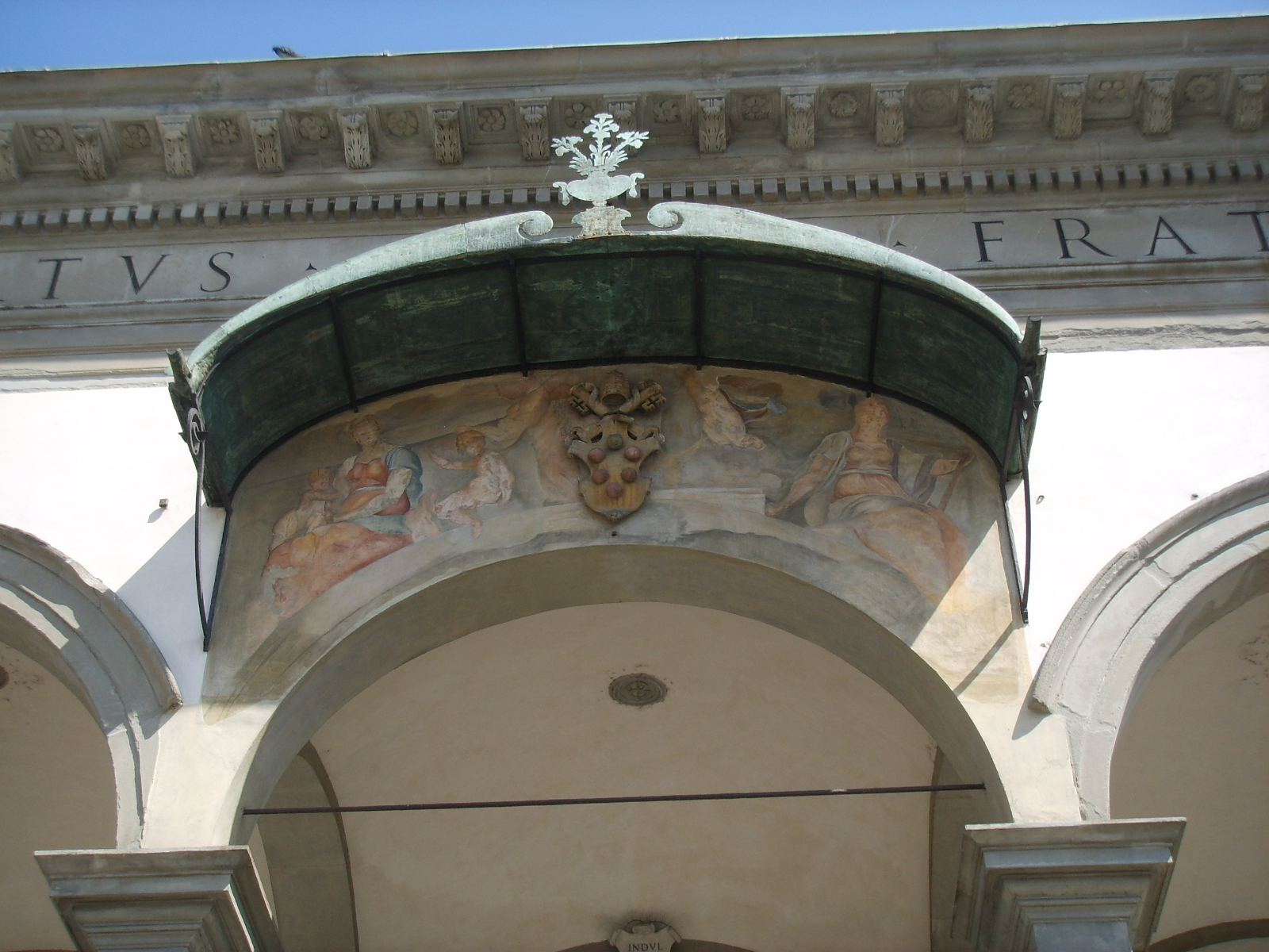 Santissima annuziata, lunetta del pontormo